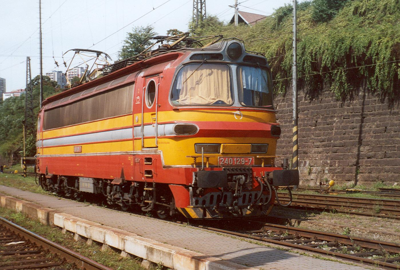 240.129-7 in Bratislava h.l.n.